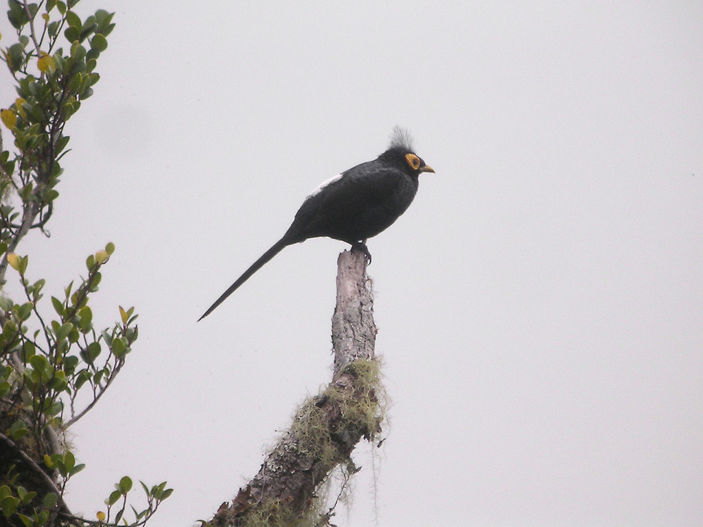 Apo Myna (Basilornis mirandus) Mount Kitanglad, Mindanao